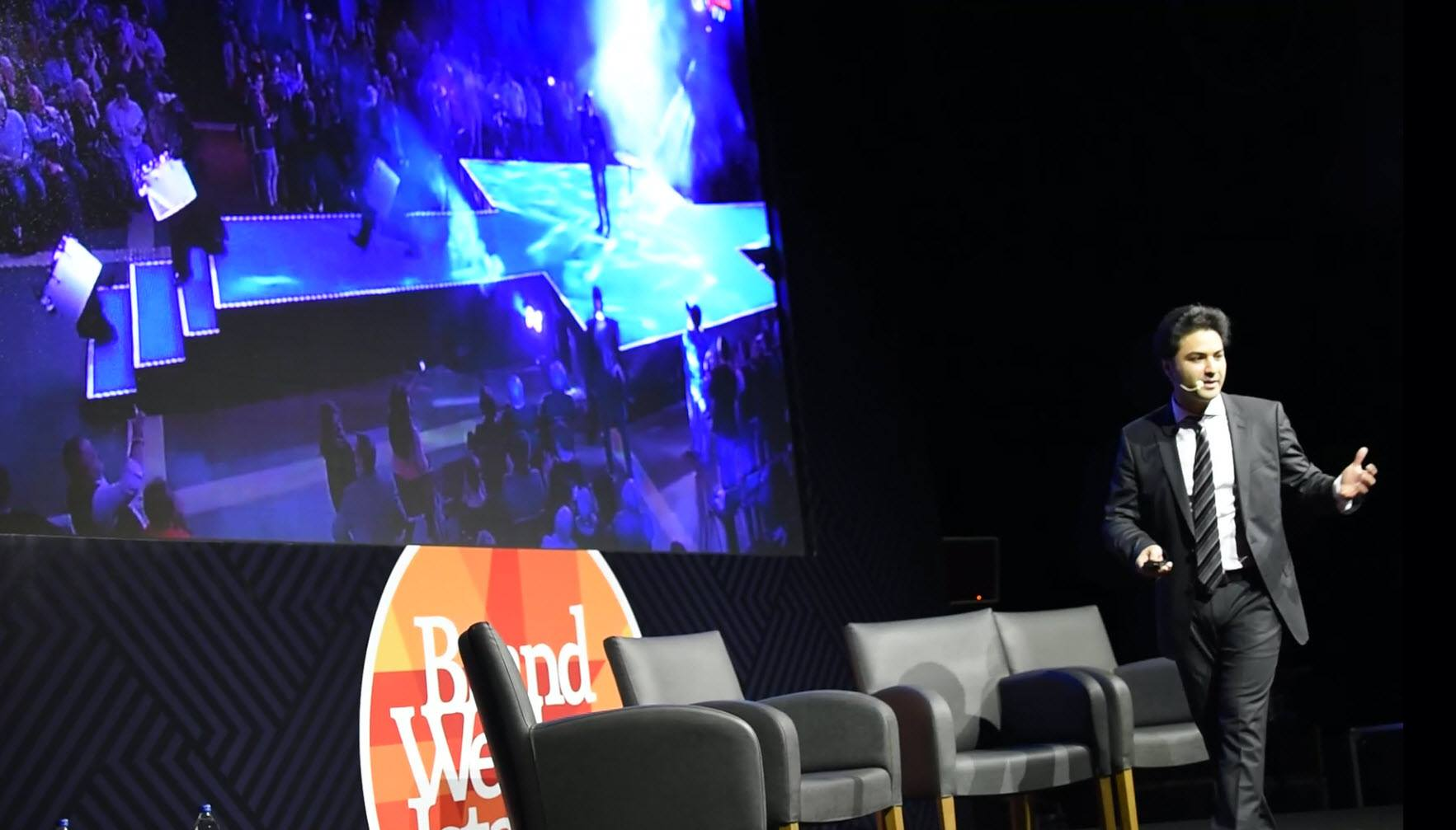 Vortrag des Politikberaters Dr. Reza Kazemi vor Publikum